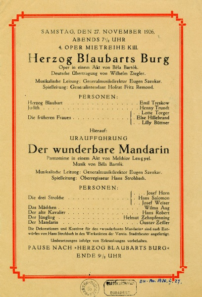 Az ősbemutató plakátja.